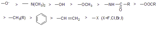 第一类定位基（部分）及其排序